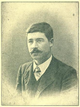 Мануш Георгиев.